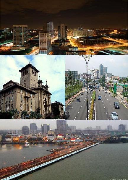 Johor Bahru